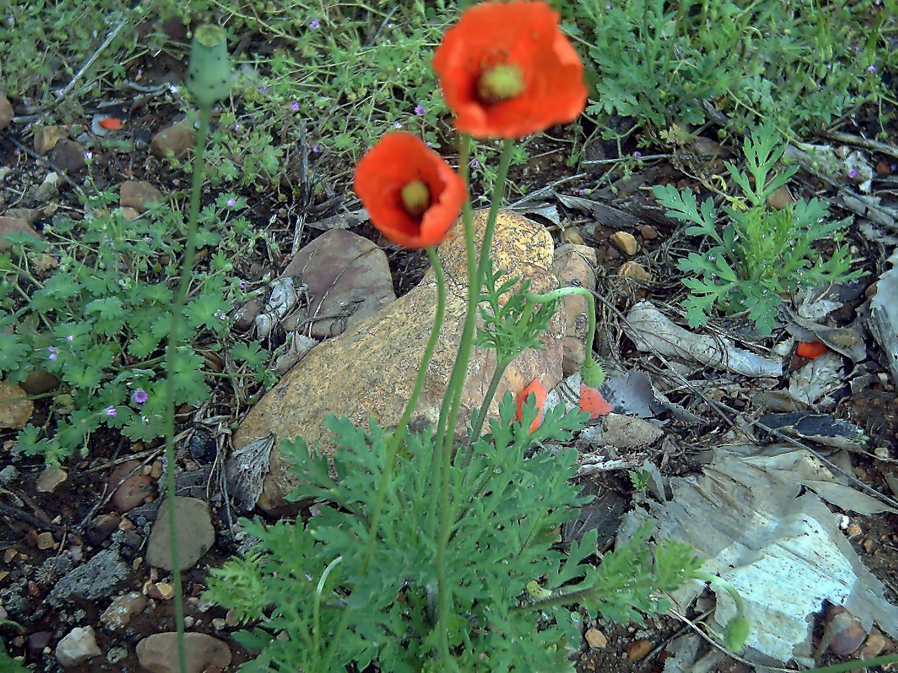 Papaver dubium plant Dehesa Boyal de Puertollano